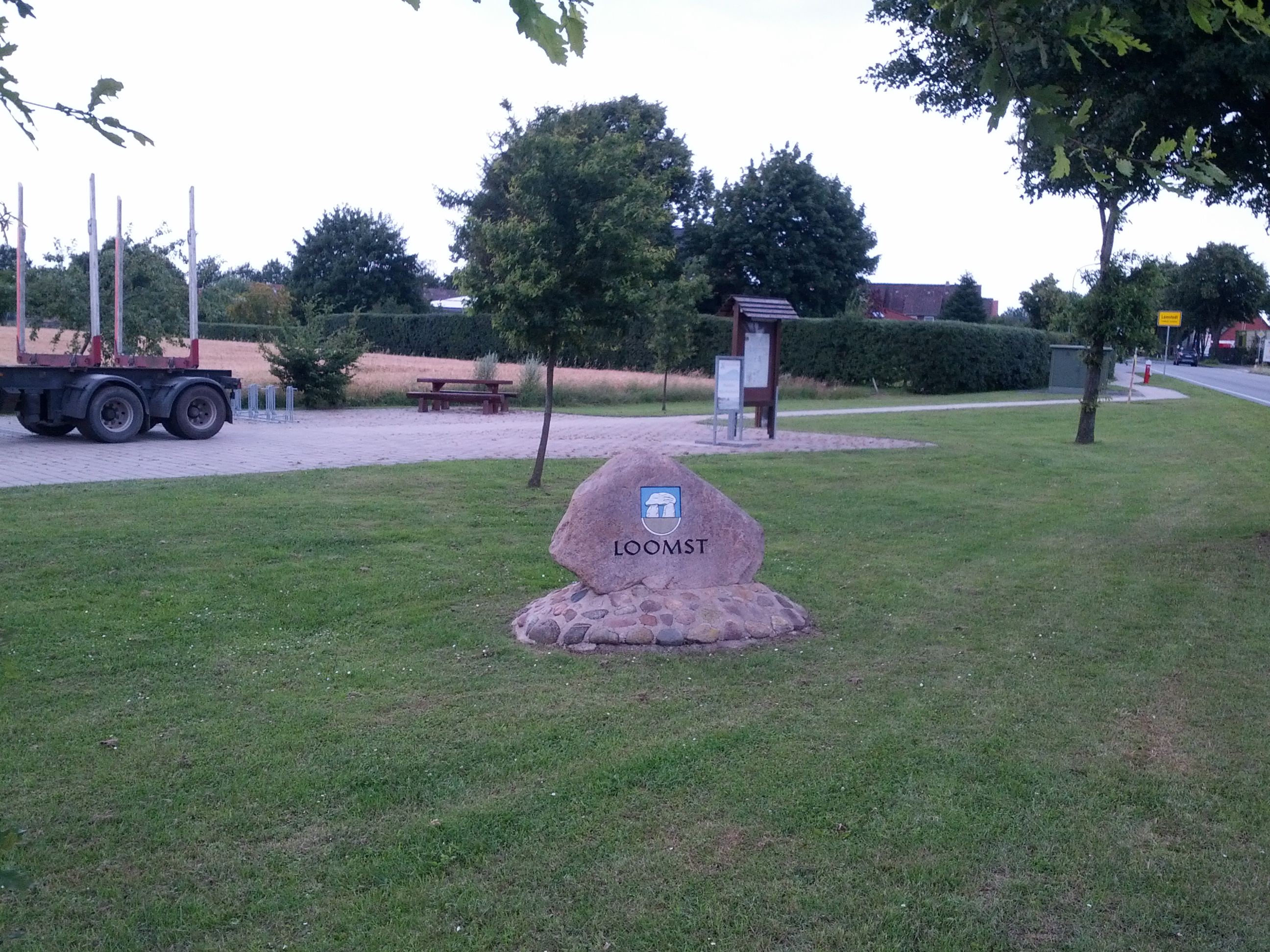 Wapensteen in Loomst, Landkreis Cuxhoben, mit den Naam op Plattdüütsch